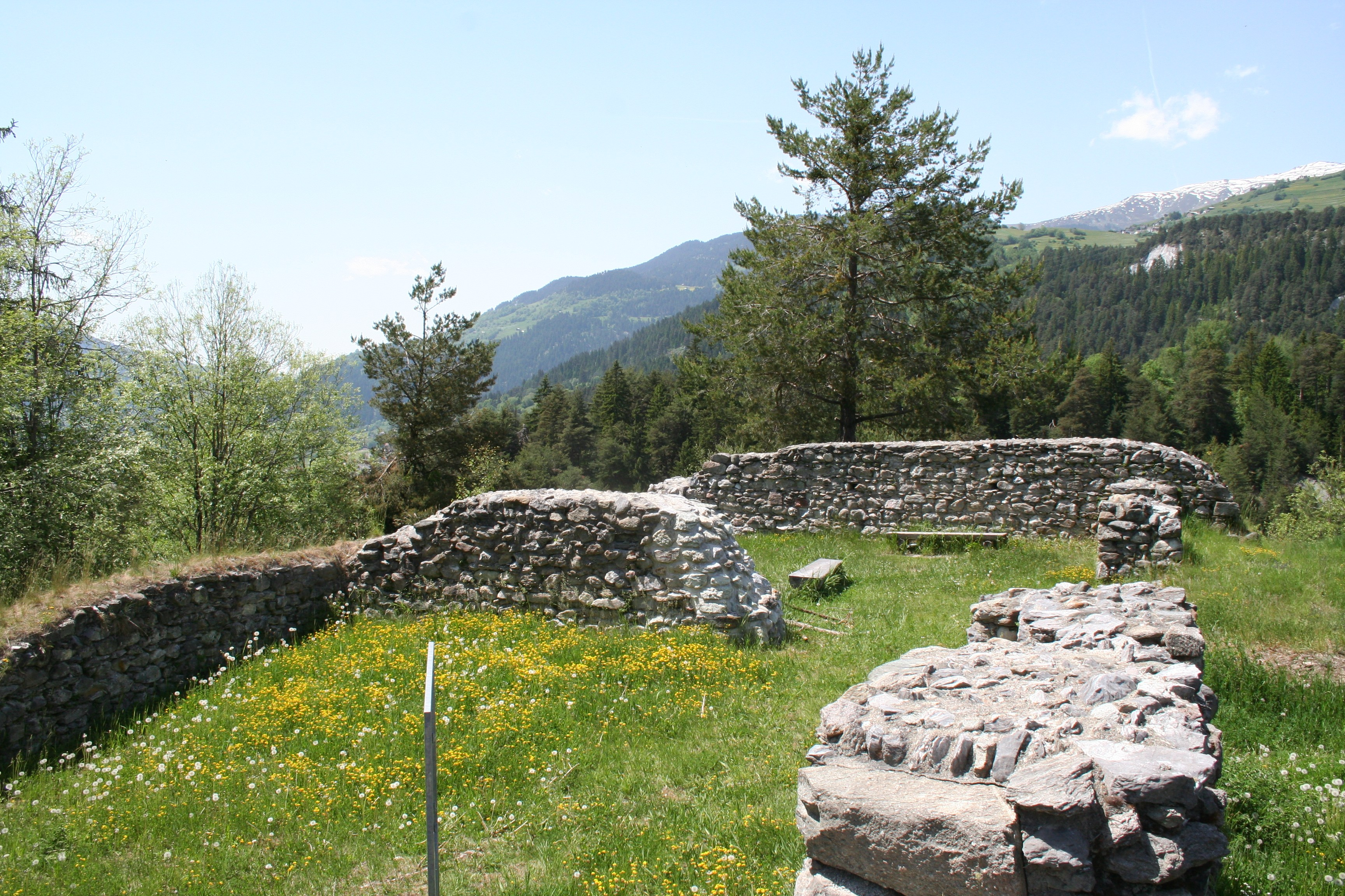 Burg Schiedberg Richtung Südwesten